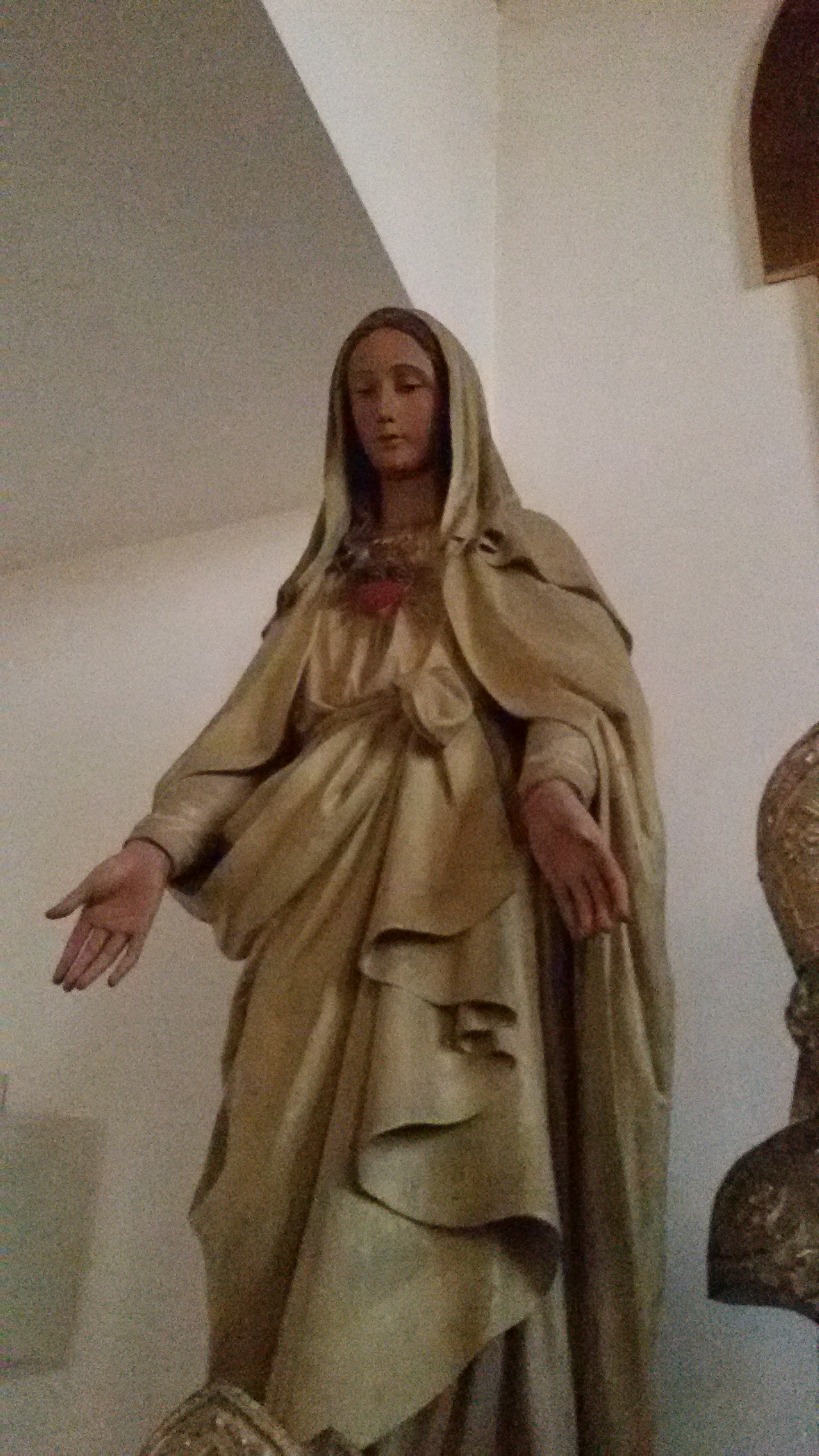 Chiesa di Santa Cristina Quinto di Treviso